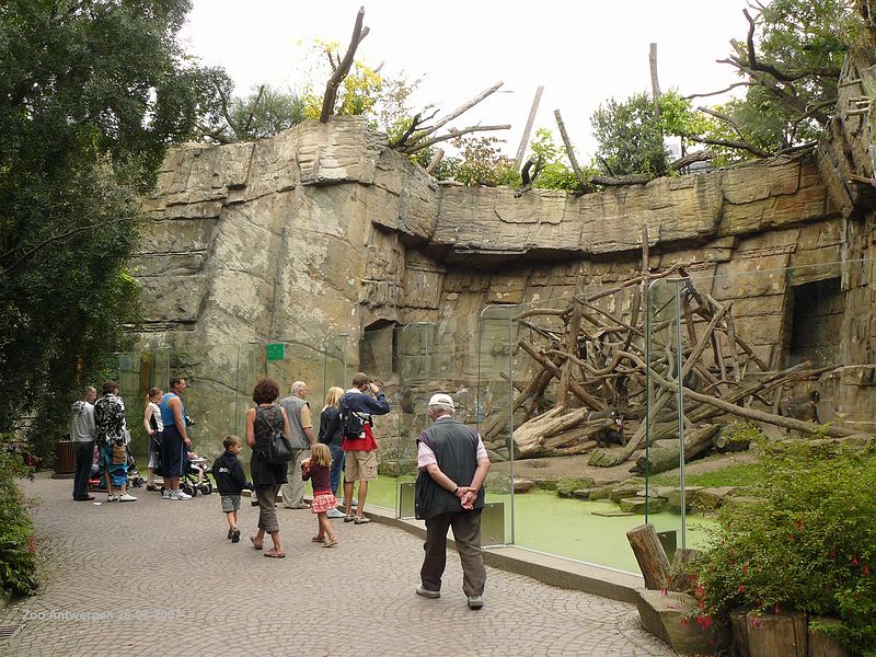 Verblijf Mandrils in de Antwerpse Zoo